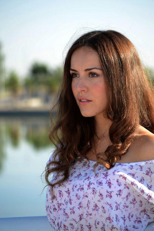 Claudia Molina, actriz española.